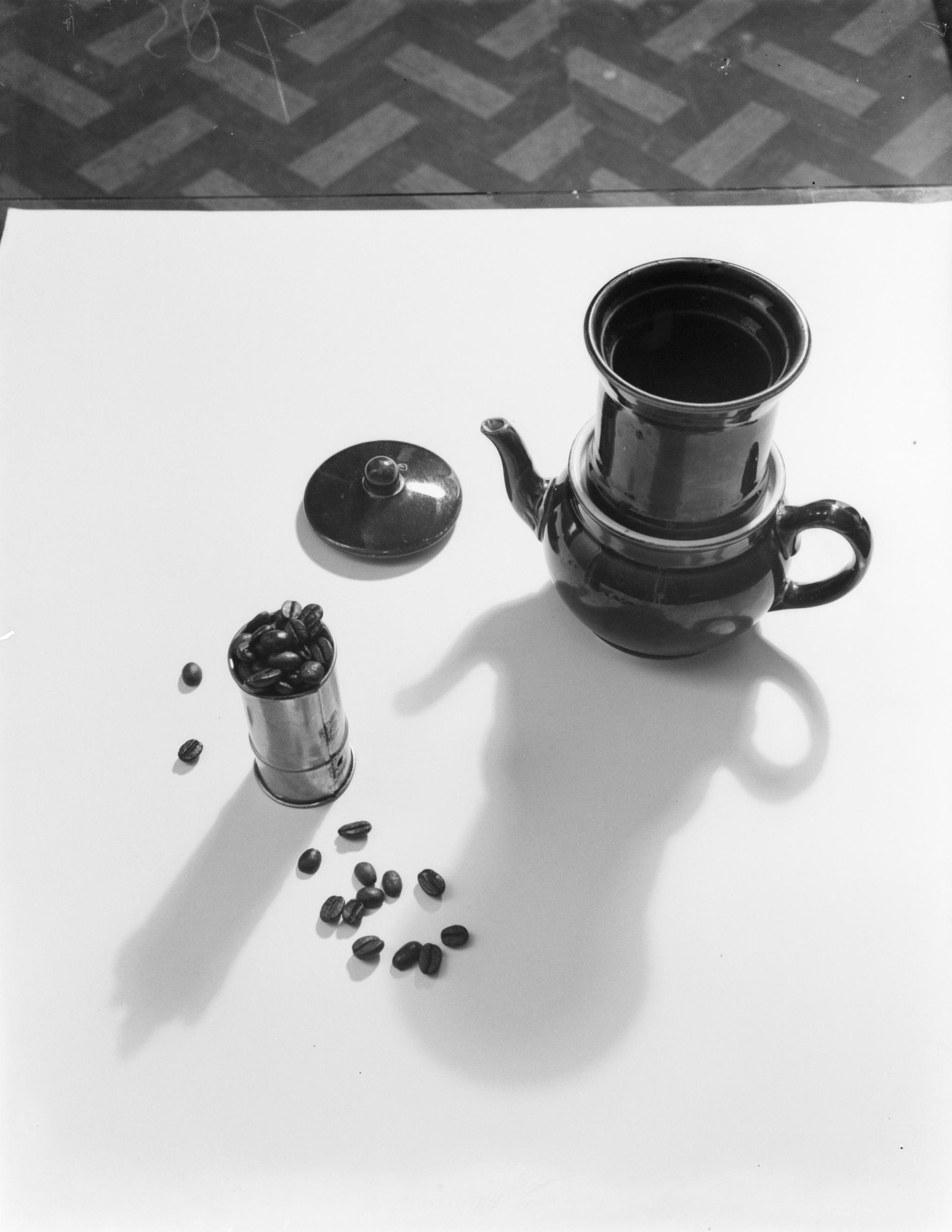 Collectie / Archief : Fotocollectie Van de Poll Reportage / Serie : Reclamefotografie Beschrijving : Koffiekan voor het zetten van filterkoffie met losse koffiebonen ernaast, in een zgn. loodje (maatbekertje) Datum : 1932 Trefwoorden : koffie, serviesgoed Fotograaf : Poll, Willem van de Auteursrechthebbende : Nationaal Archief Materiaalsoort : Glasnegatief Nummer archiefinventaris : bekijk toegang 2.24.14.02 Bestanddeelnummer : 252-0433